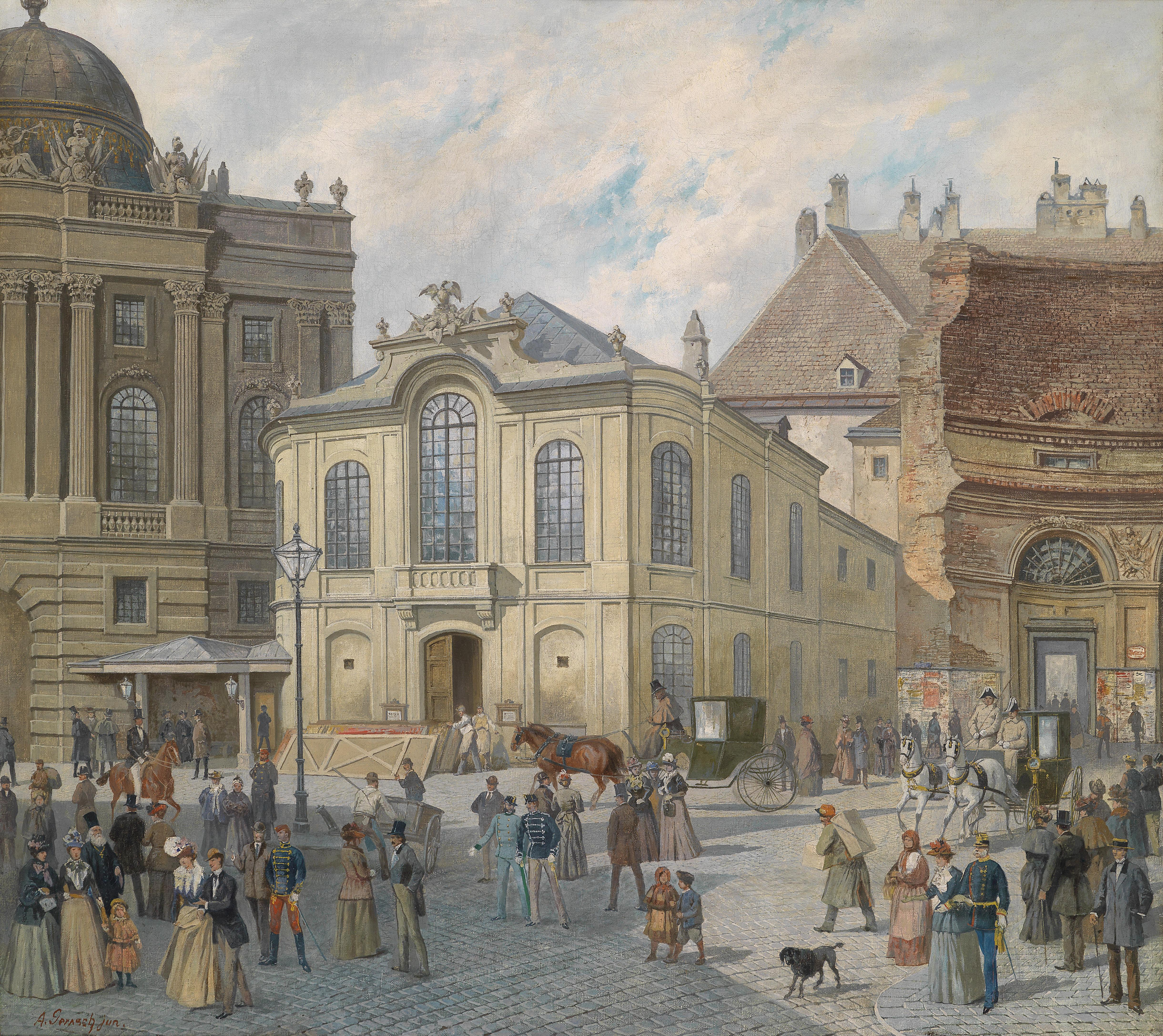 Wien, vor dem alten Burgtheater